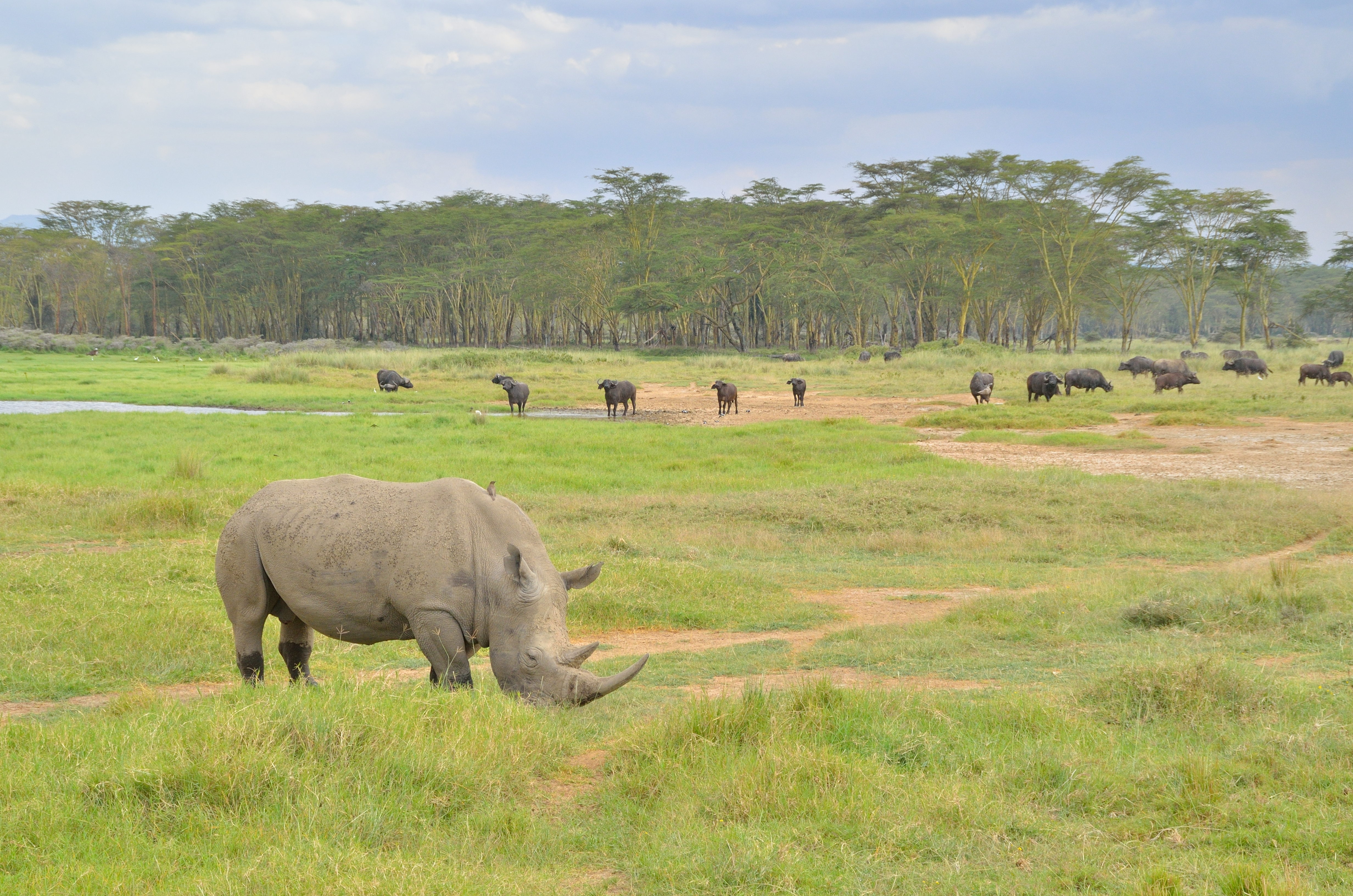 Safari por Kenia